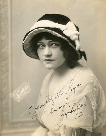 Peggy O'Neil